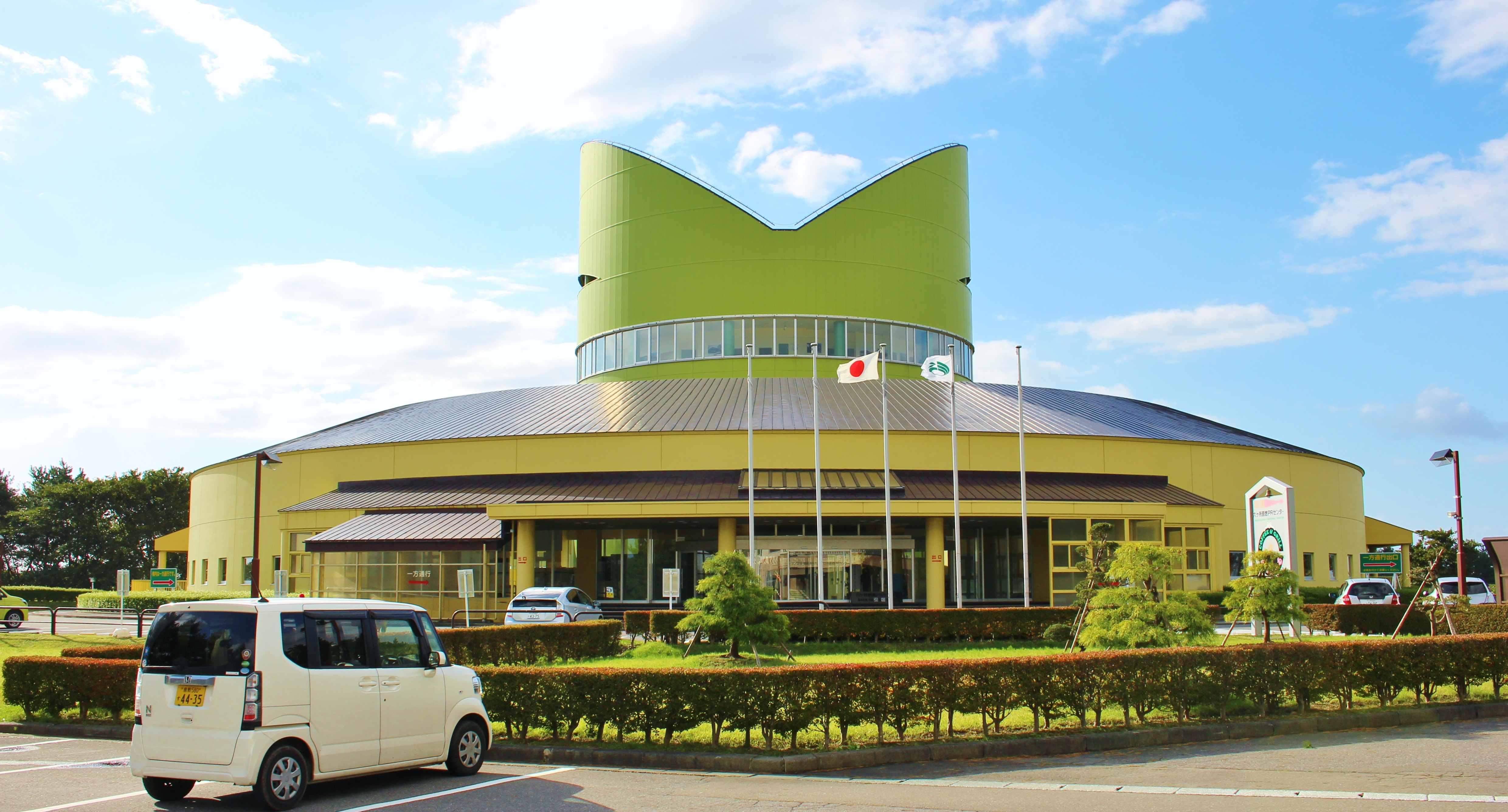 六ヶ所原燃PRセンター